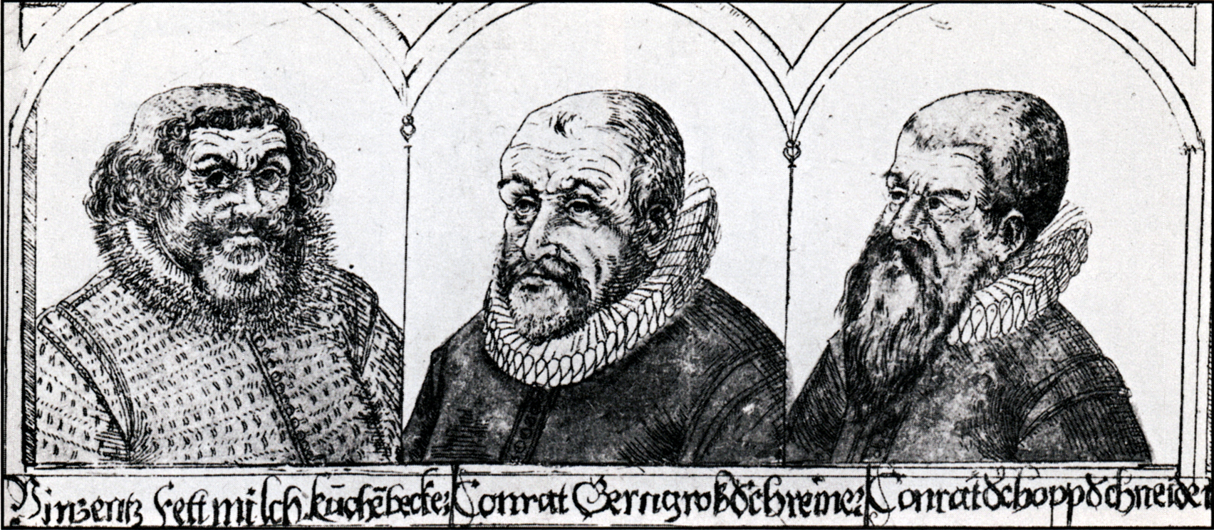 Vizenz Fettmich, Conrad Gerngroß und Conrad Schopp, die Anführer des Fettmilch-Aufstandes, Stich aus dem frühen 17. Jahrhundert, Text auf dem Stich: Vinzentz Fettmilch Kuchebecker Conrat Gerngroß Schreiner Conrat Schopp Schneider